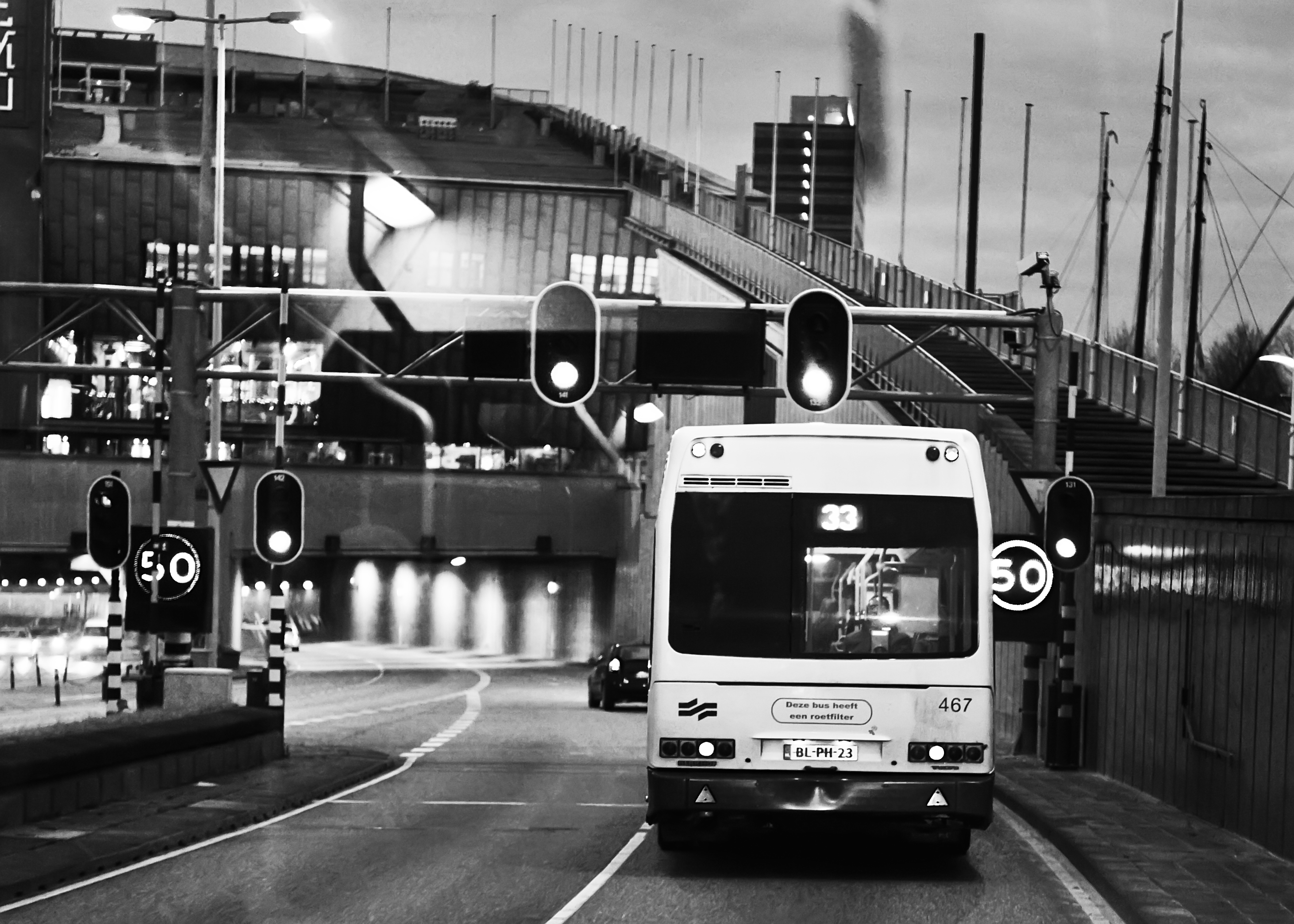 IJtunnel van centrum richting noord